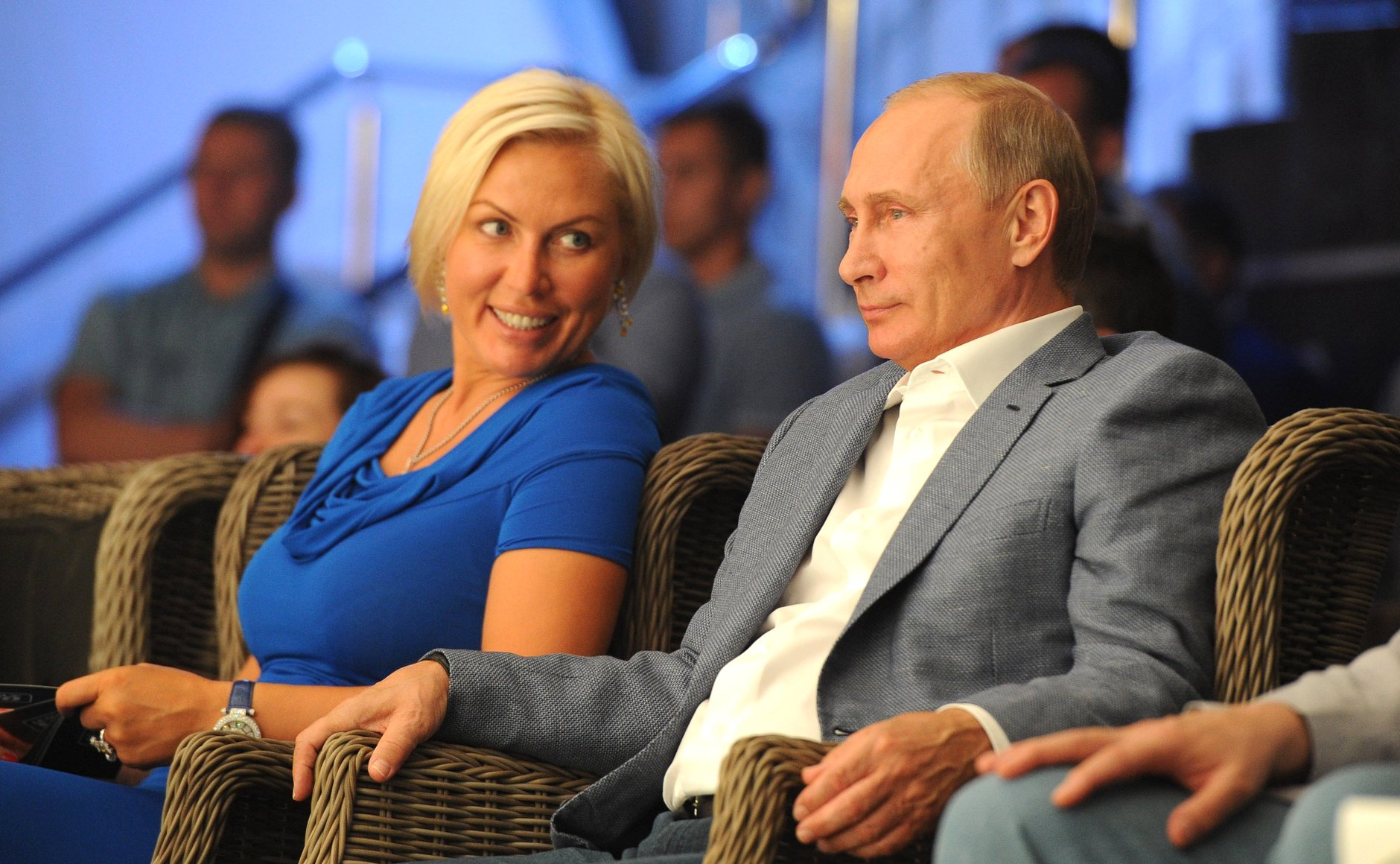 На международном турнире по боевому самбо «ПЛОТФОРМА S-70». Владимир Путин с чемпионкой мира по боксу Натальей Рагозиной